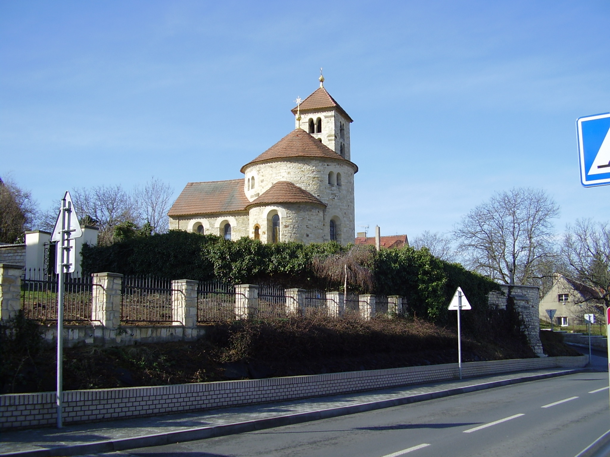 Kostel - původně románská rotunda